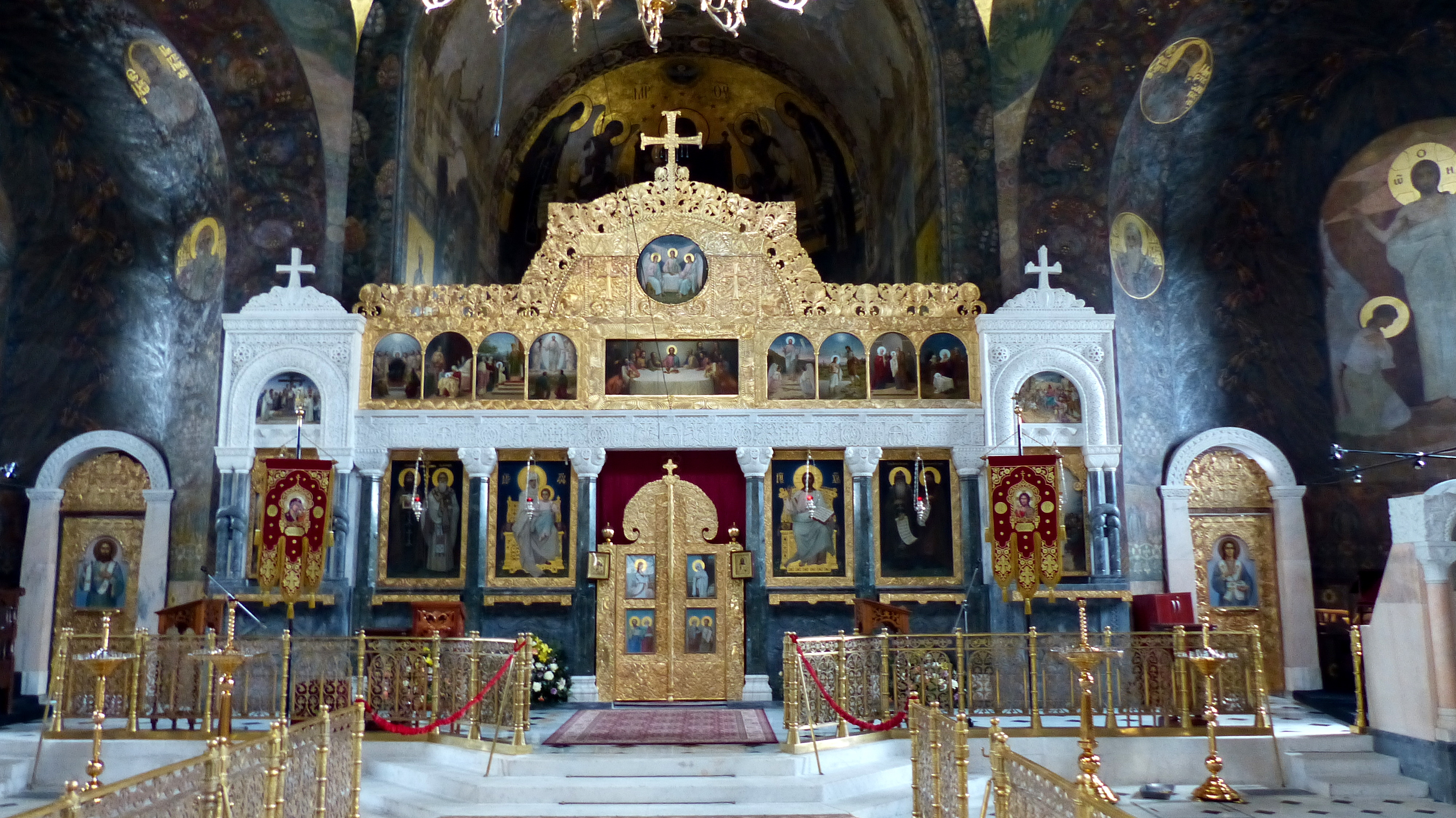 Палата трапезна з церквою Антонія і Феодосія, Київ, Лаврська вул., 9